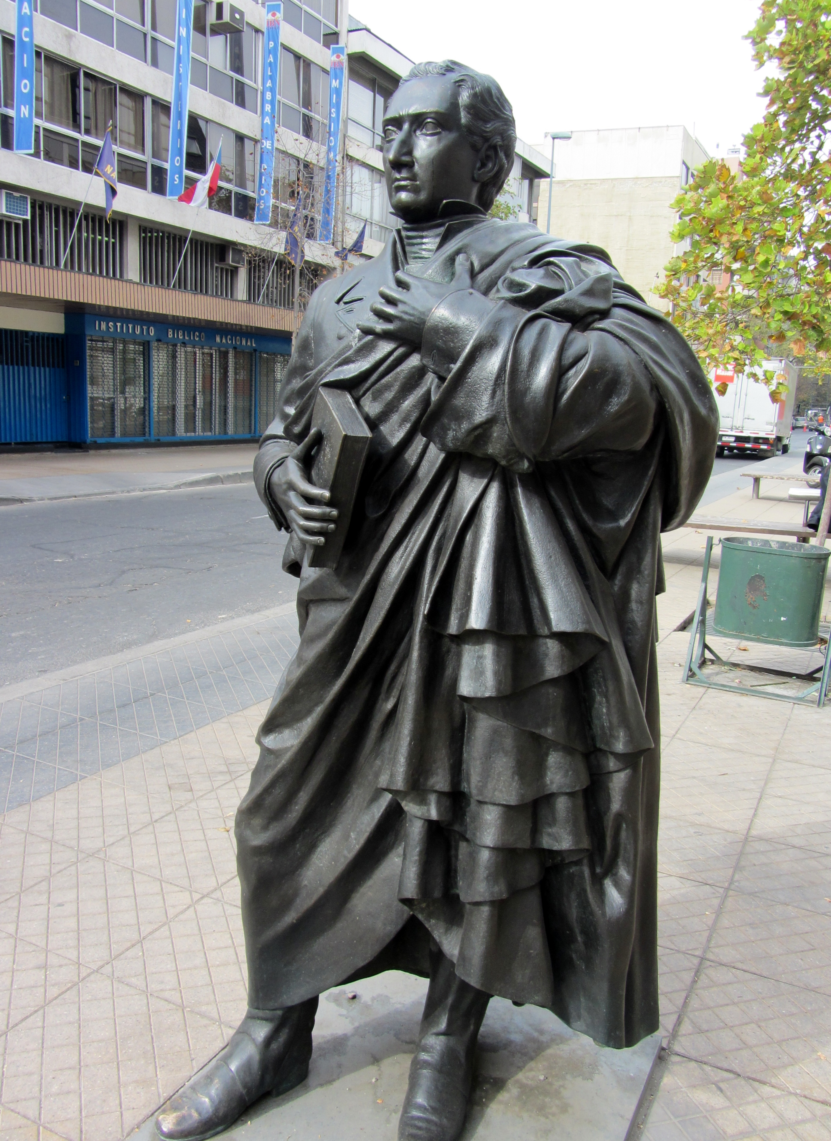 Escultura de Diego Portales por Juan Sebastián Solar. Se encuentra frente al palacio Piwonka, sede central de la Universidad Diego Portales y fue hecha por encargo de esta.